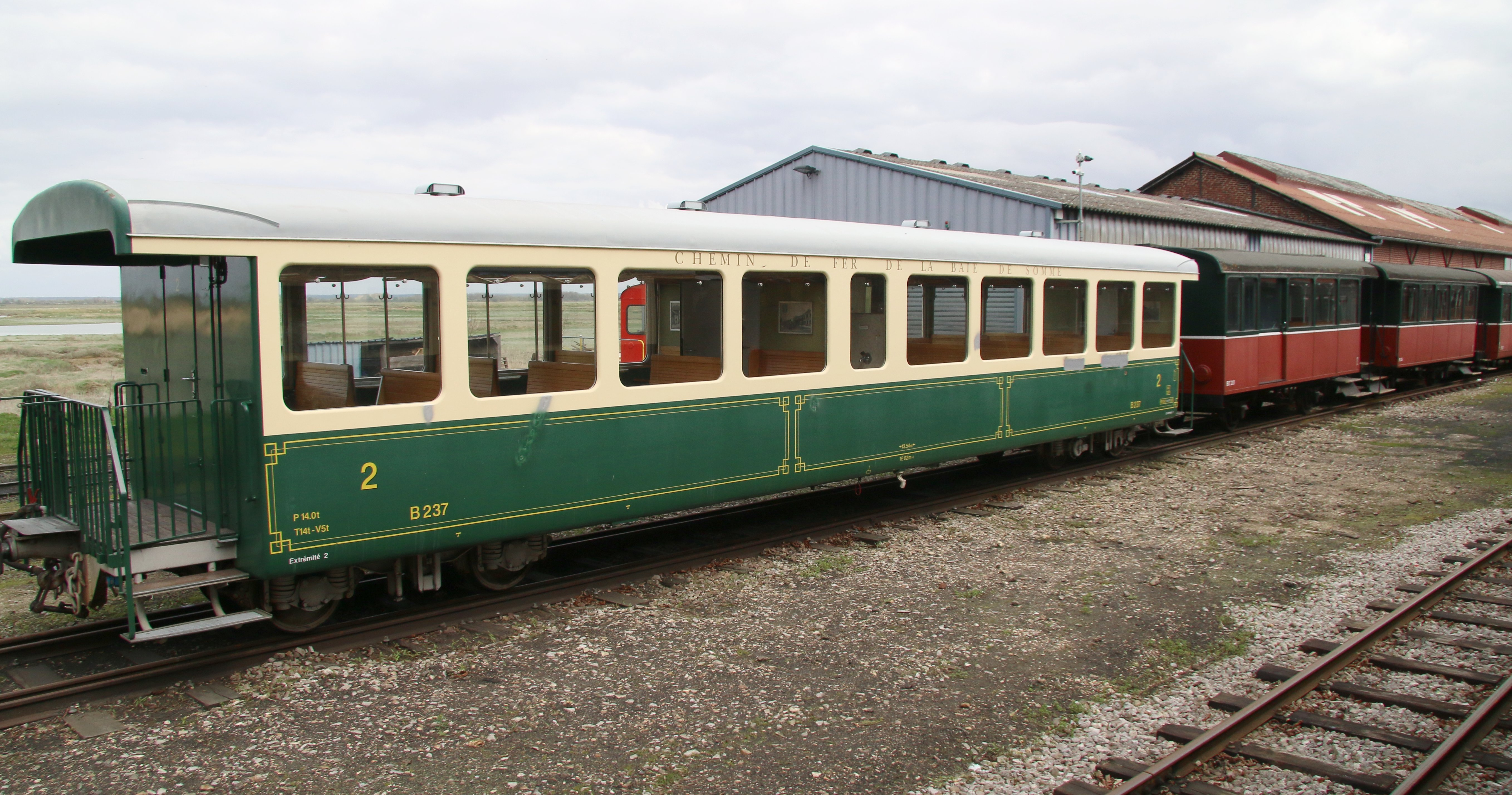 La voiture Bf 237 ex-Berner Oberland-Bahn (Suisse), sur le Chemin de fer de la baie de Somme.